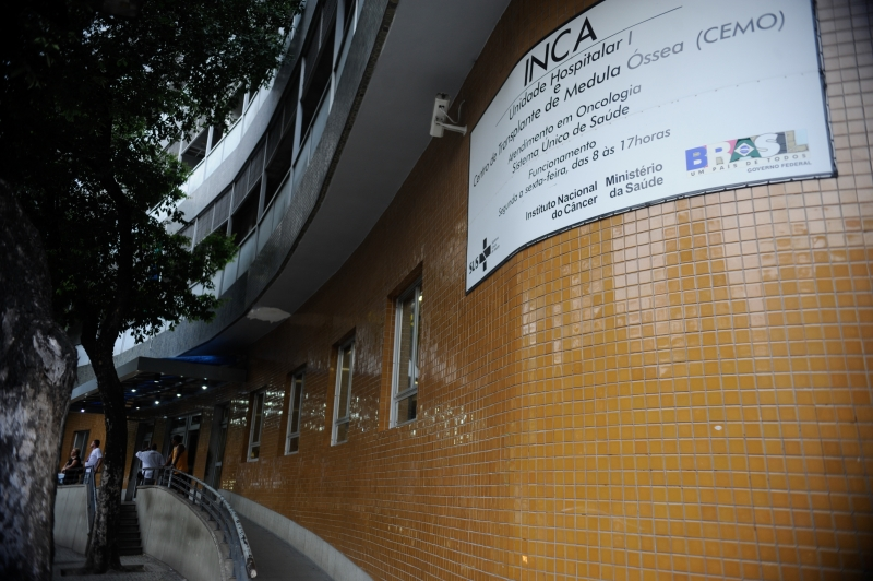 Hospital do Instituto Nacional do Câncer (Inca), na Praça da Cruz Vermelha, no centro do Rio de Janeiro. Foto: Fernando Frazão / ABr